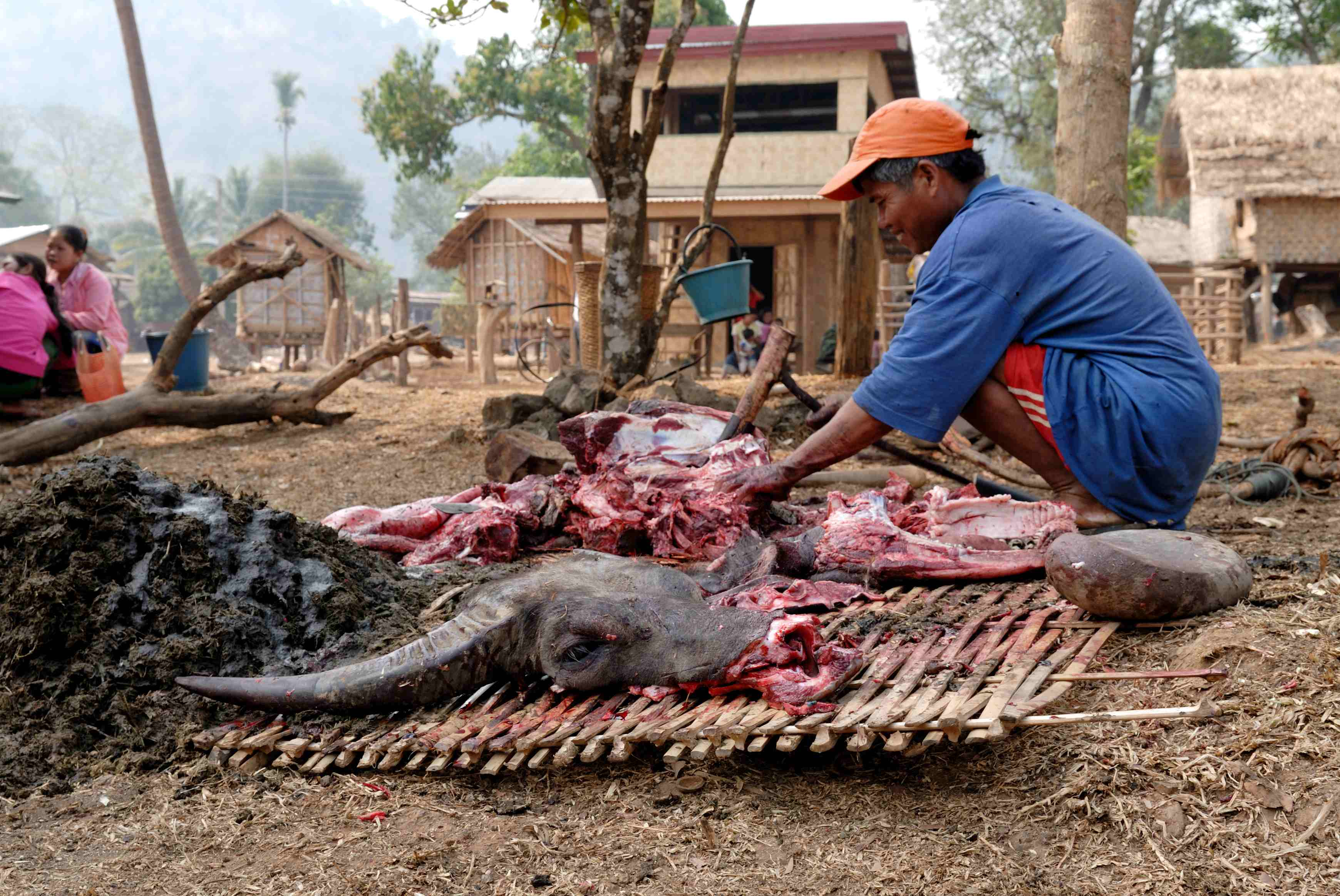 Laos